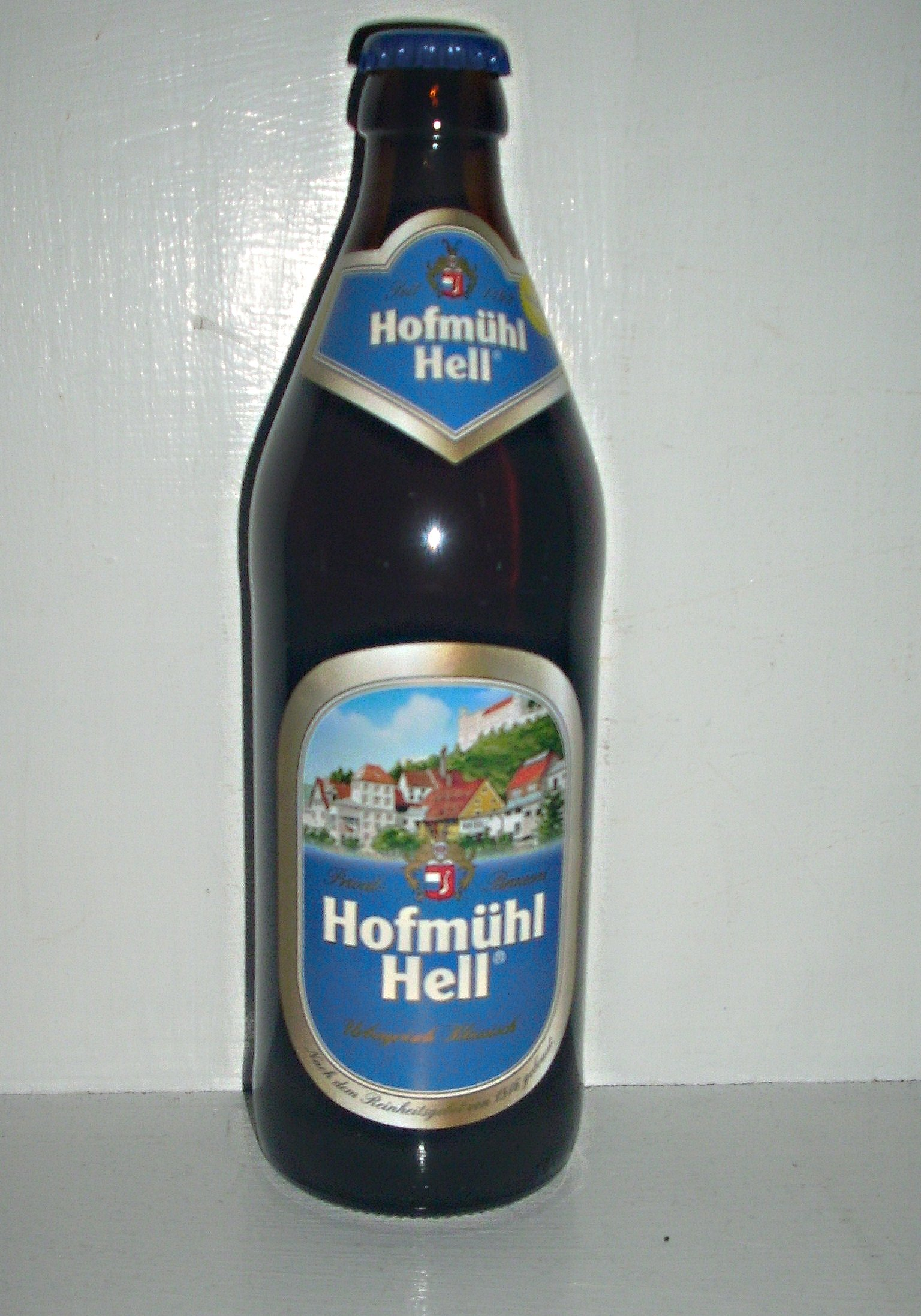 Eine Flasche Hofmühl Hell